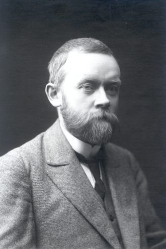 Walter Anderson, saksa folklorist